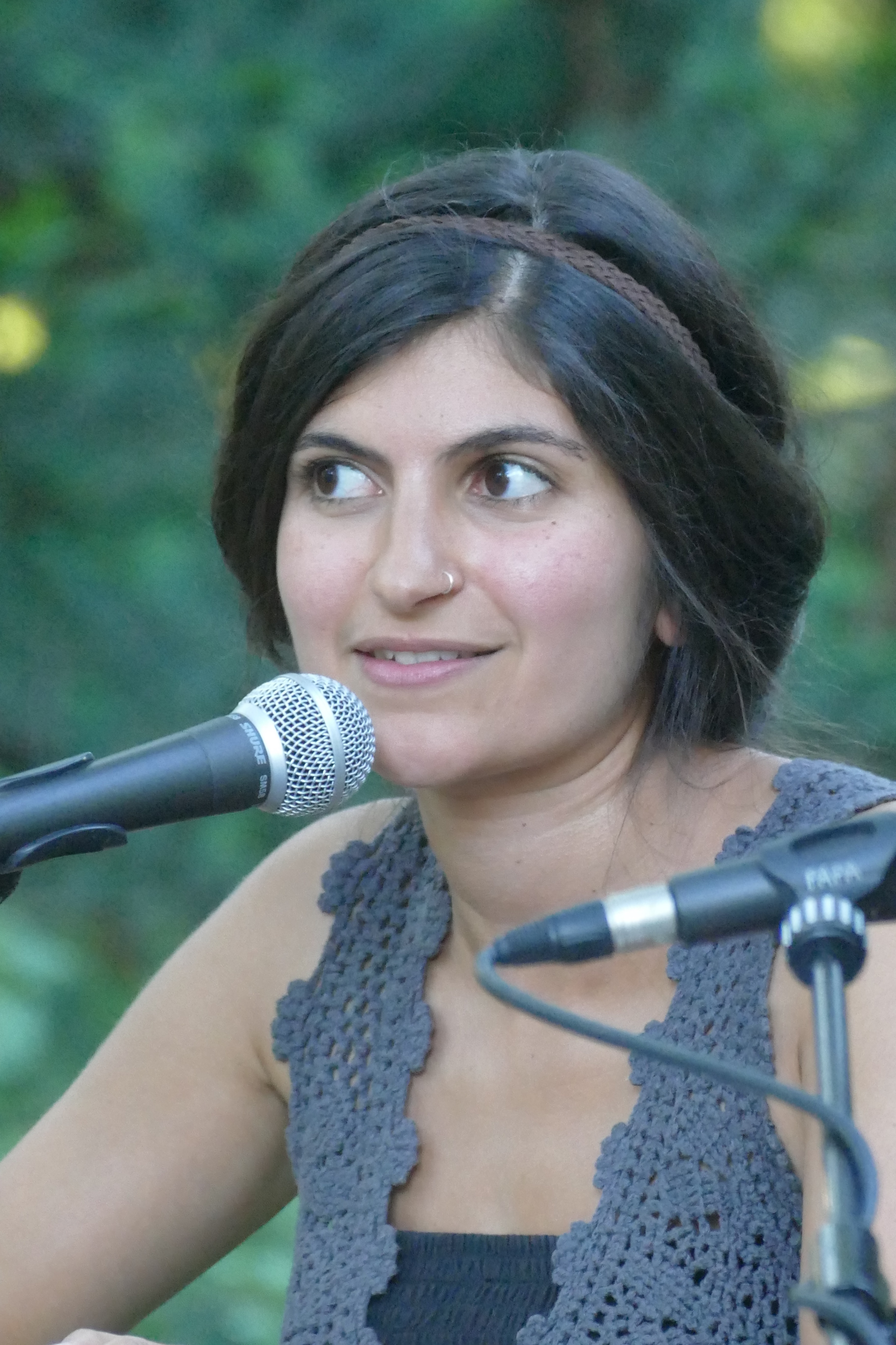 Shida Bazyar stellt auf dem Erlanger Poetenfest 2016 ihren Roman "Nachts ist es leise in Teheran" vor.